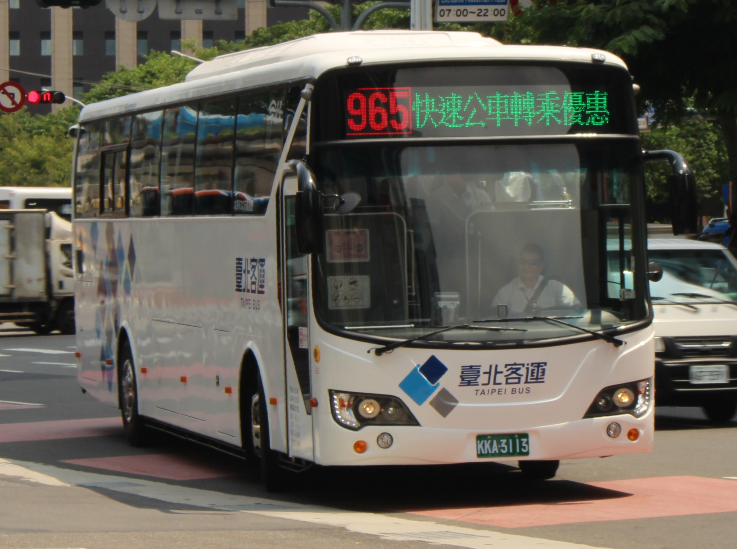 臺北客運日野RM8JSVU-SSF大客車KKA-3113 行駛965線 試車